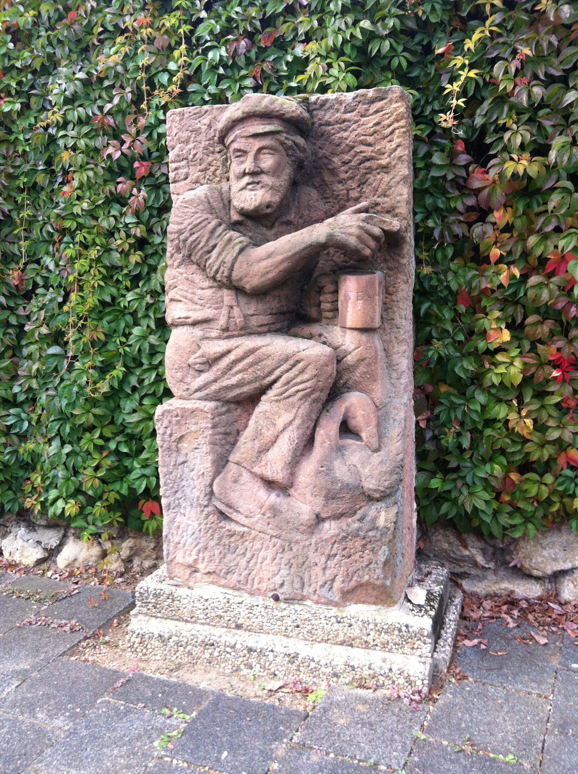 Reliefstein „Gänskippelschorsch“, Konrad-Adenauer-Ufer, Flörsheim am Main